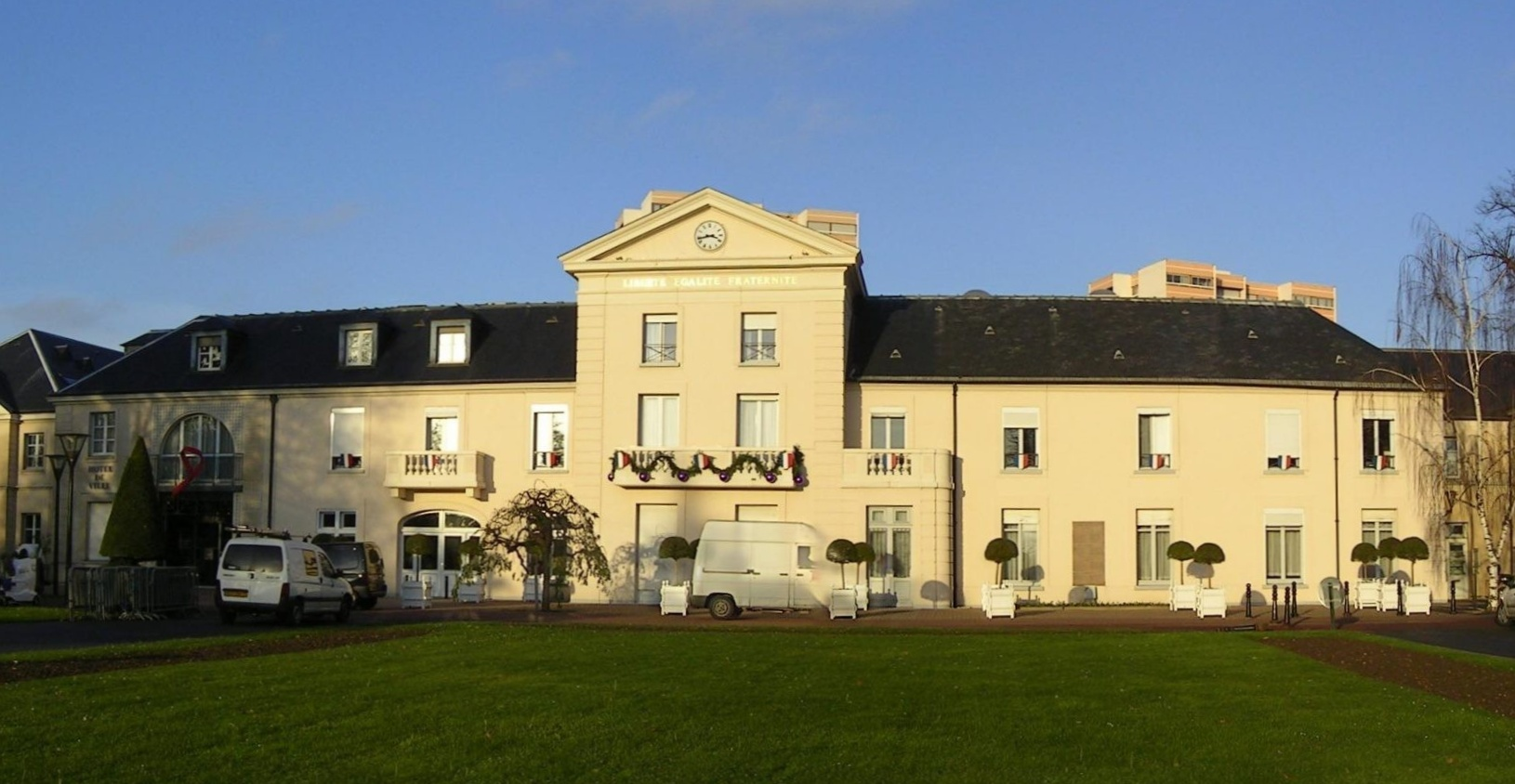 La Mairie de Chelles Photo personnelle (own work) de Marianna